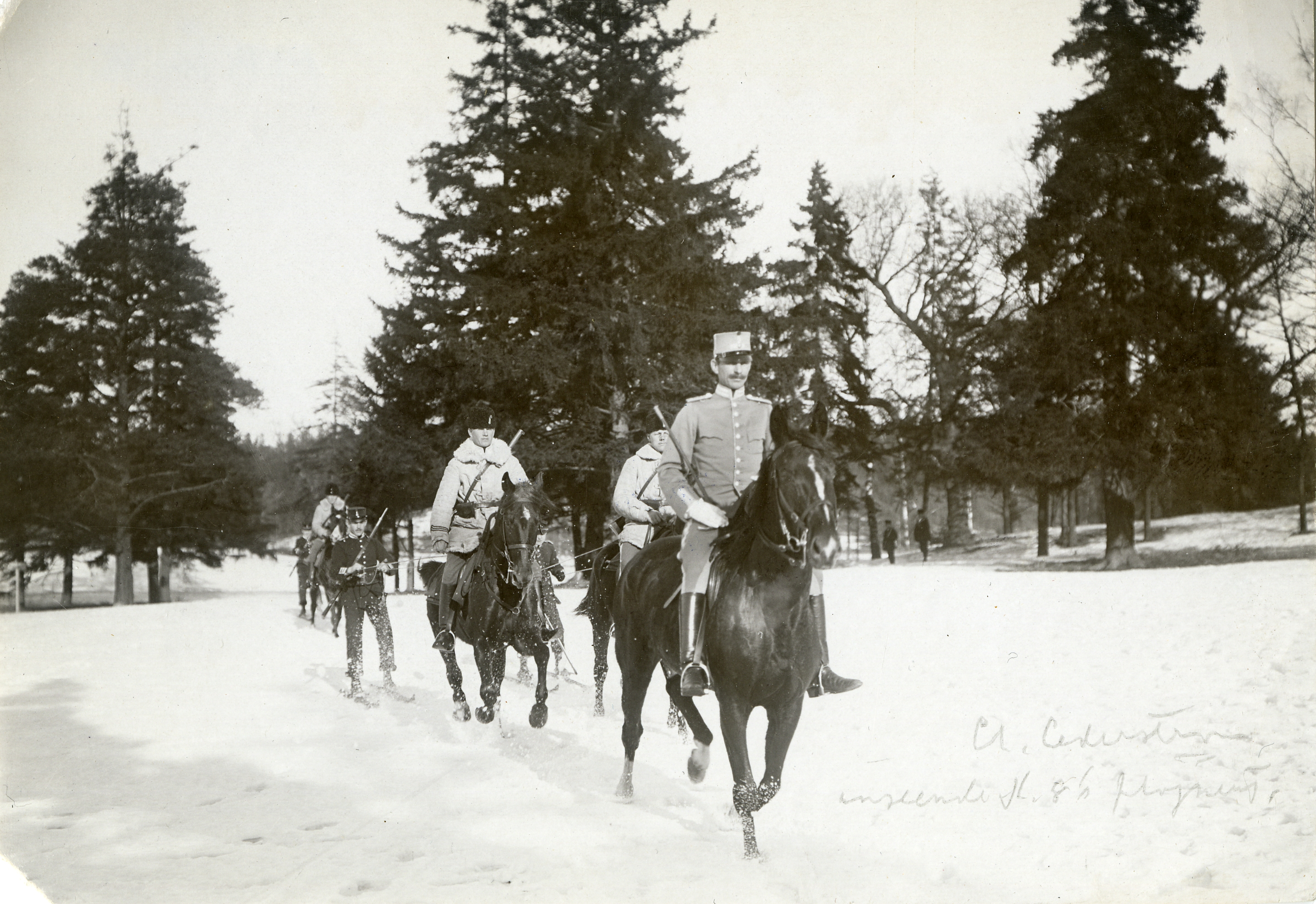 Skidtolkning Identifikationsnr: AMA.0009963 Samling: Armémuseum